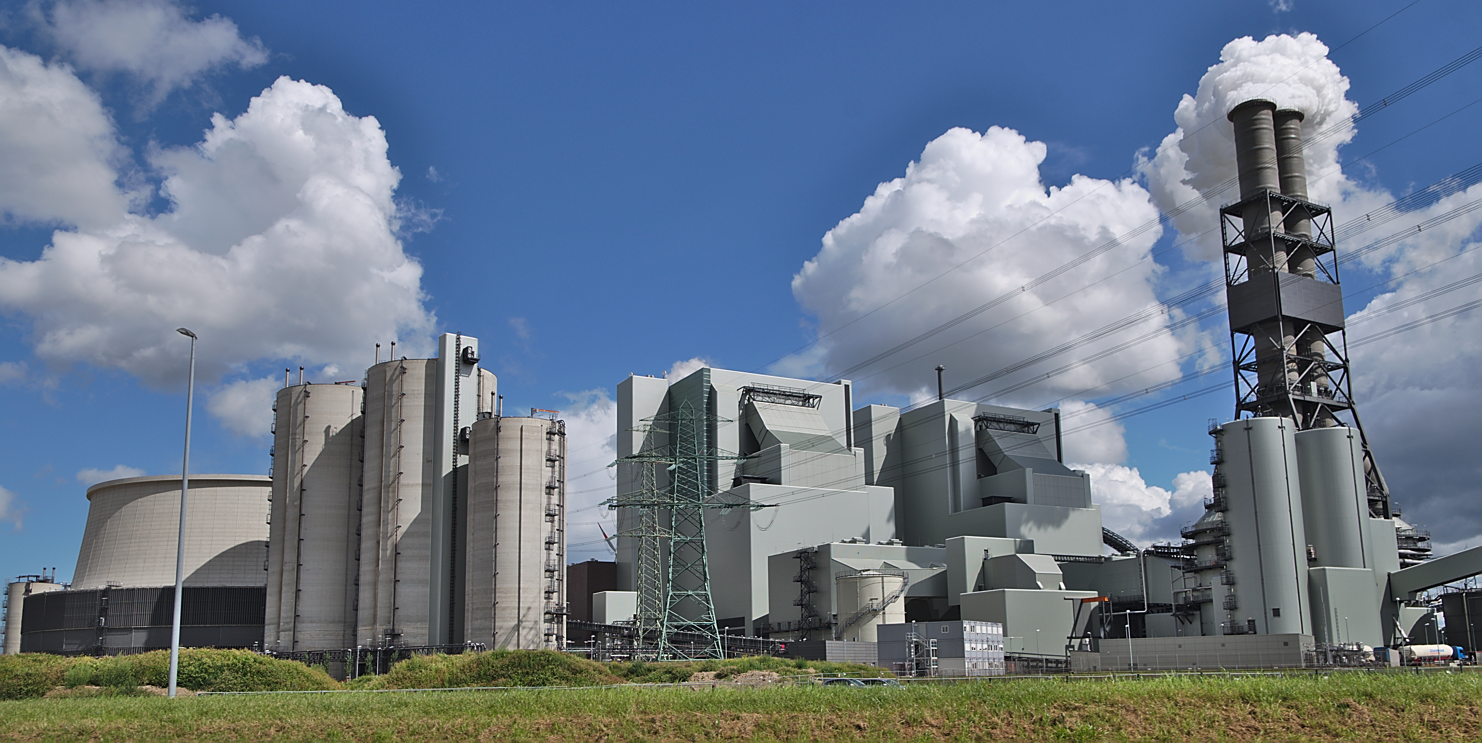 Das Kohlekraftwerk Moorburg im Jahr 2016.